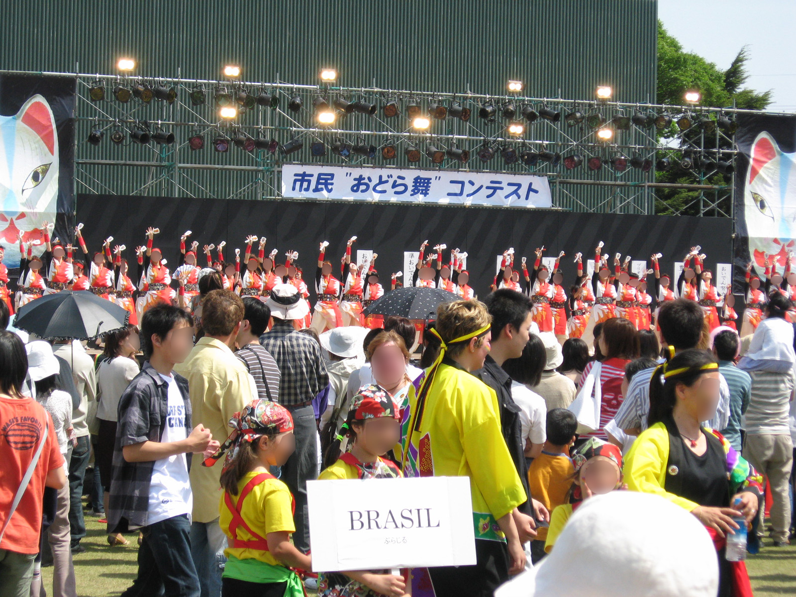 愛知県豊川市の「おいでん祭」の「市民“おどら舞”コンテスト」("Shimin(Citizens) Odoramai Contest" in Oiden-sai festival)